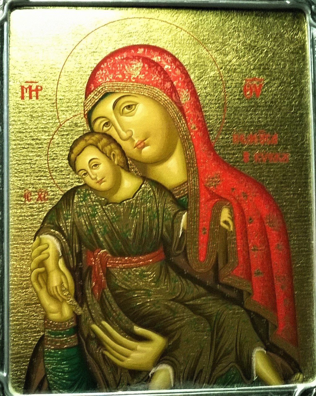 Настоящее изображение Кикской Божьей Матери,снятое мною в монастыре